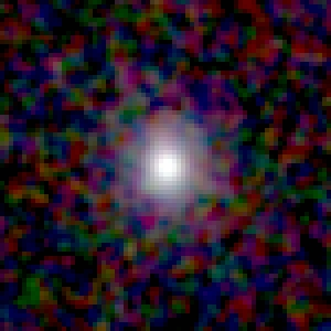 Galaxy NGC 65